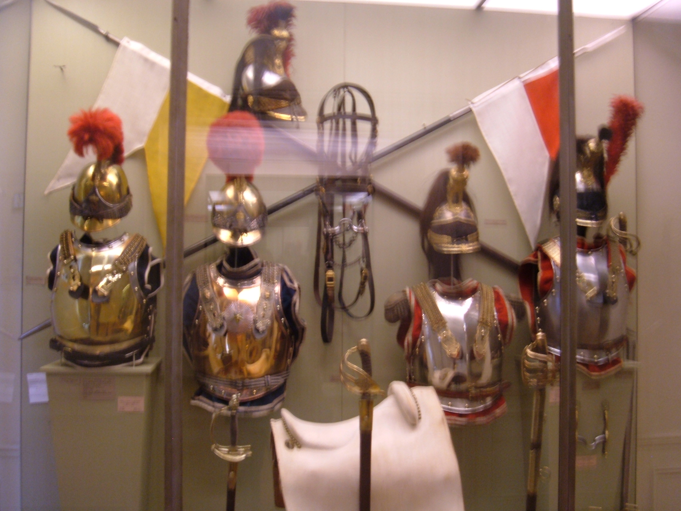 French Napoleonic cavalry armor and accoutrements at the Musée de l'Armée in Paris, France.